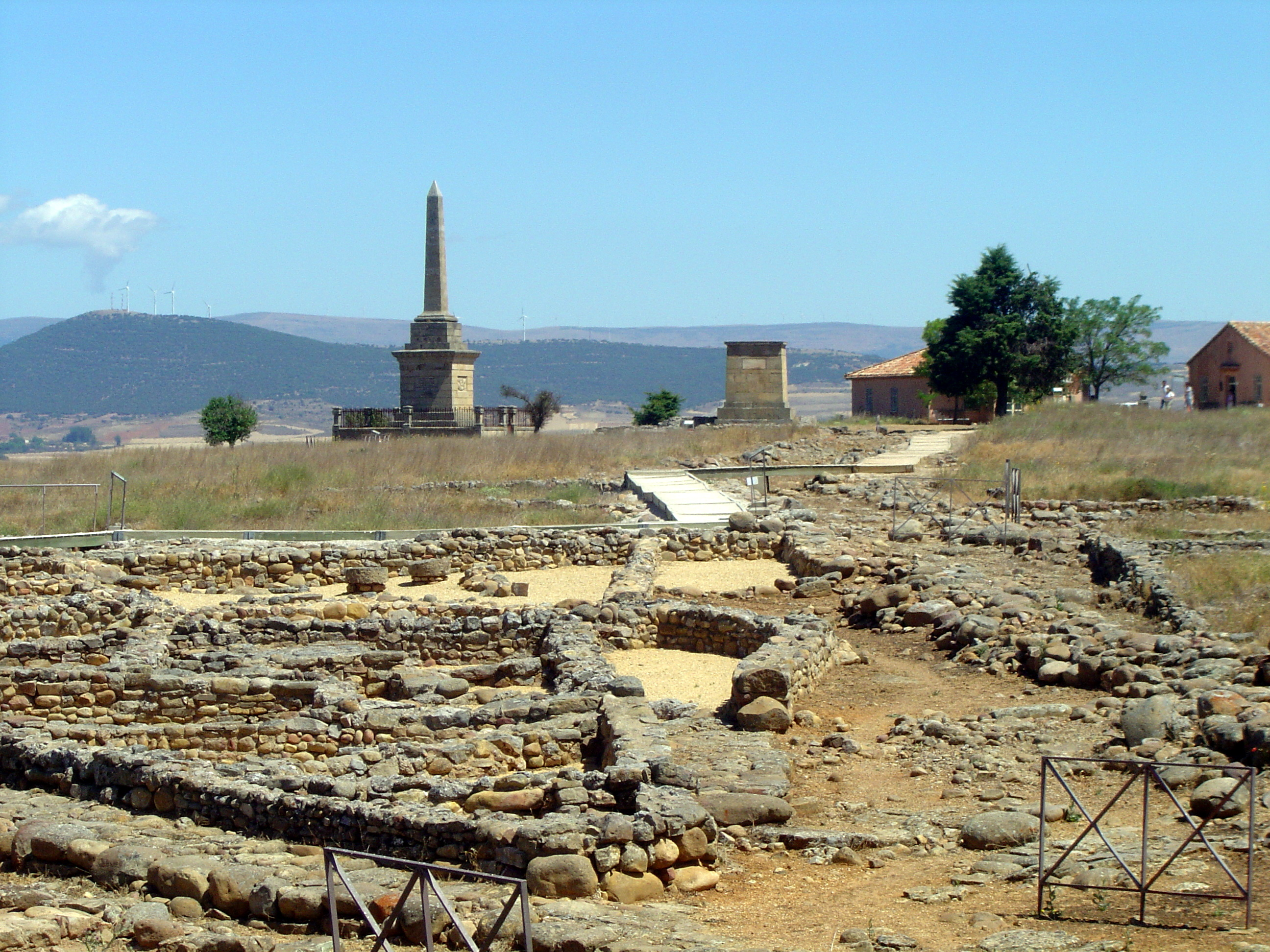 NUMANCIA 3